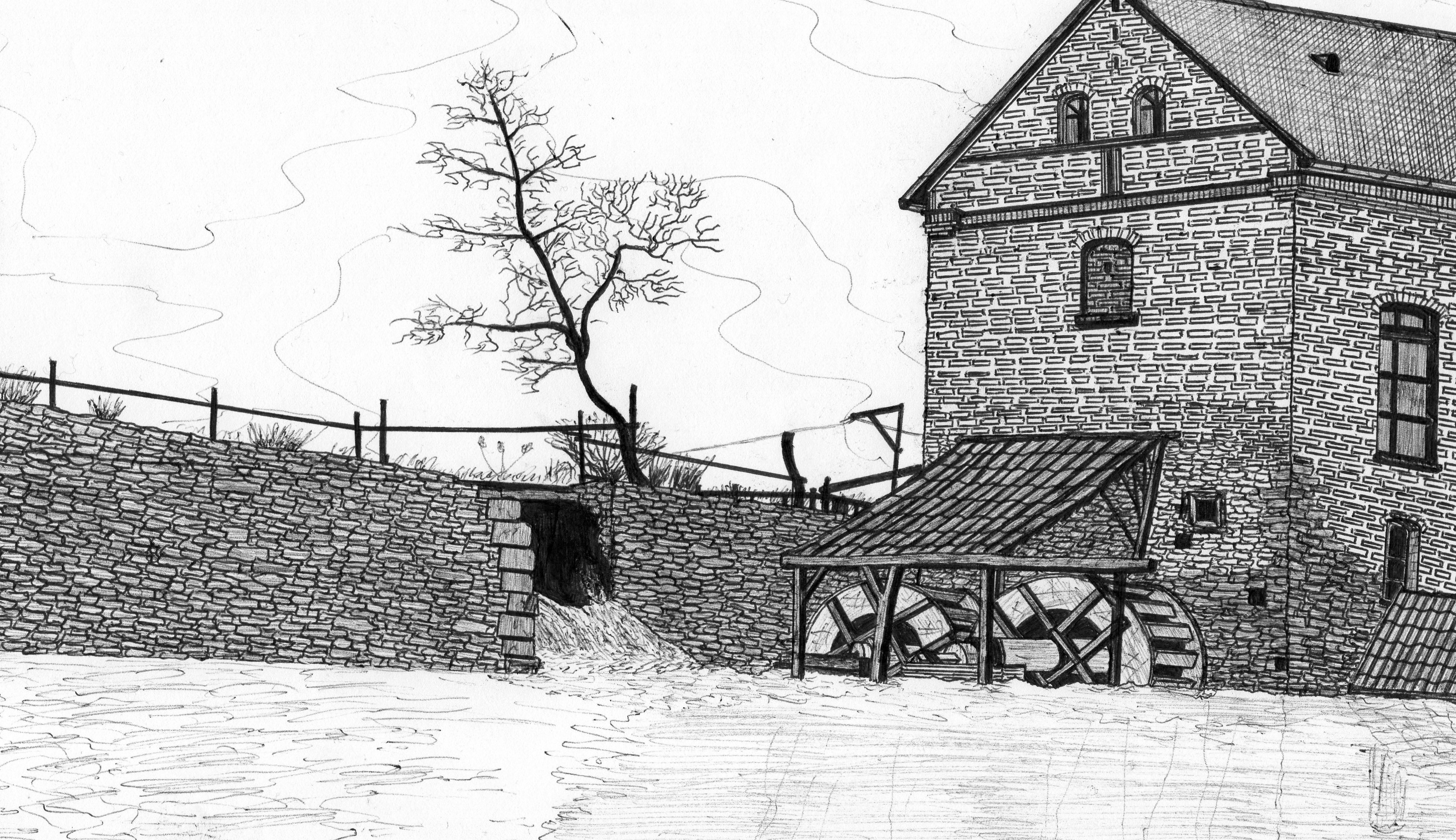 Die zweirädrige Wassermühle des Hauses Heithoff um 1913 in Dortmund Schüren.